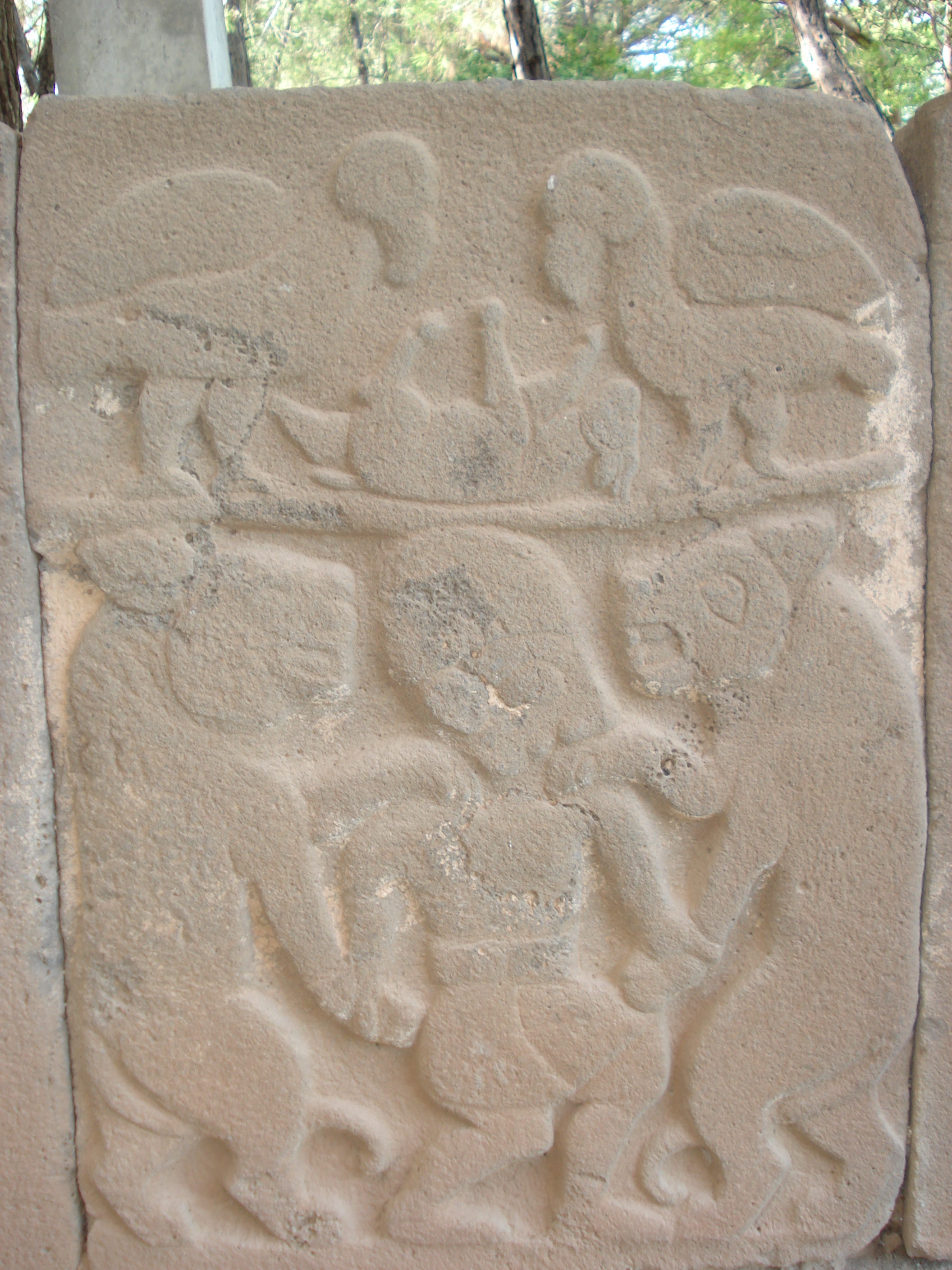 Karatepe Antik Kenti'nde taş üzerine resim kabartması.